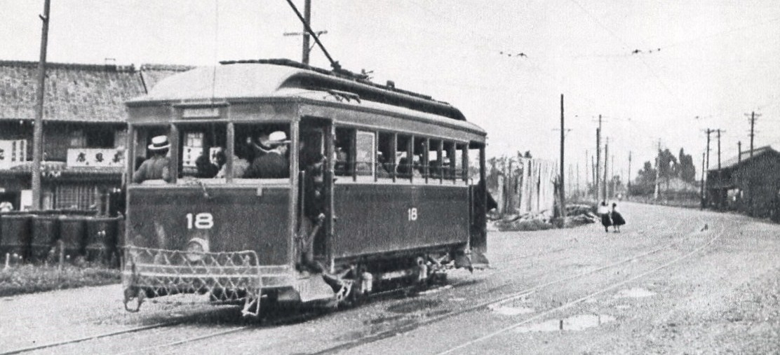 青柳町付近 当時は新三河鉄道の経営